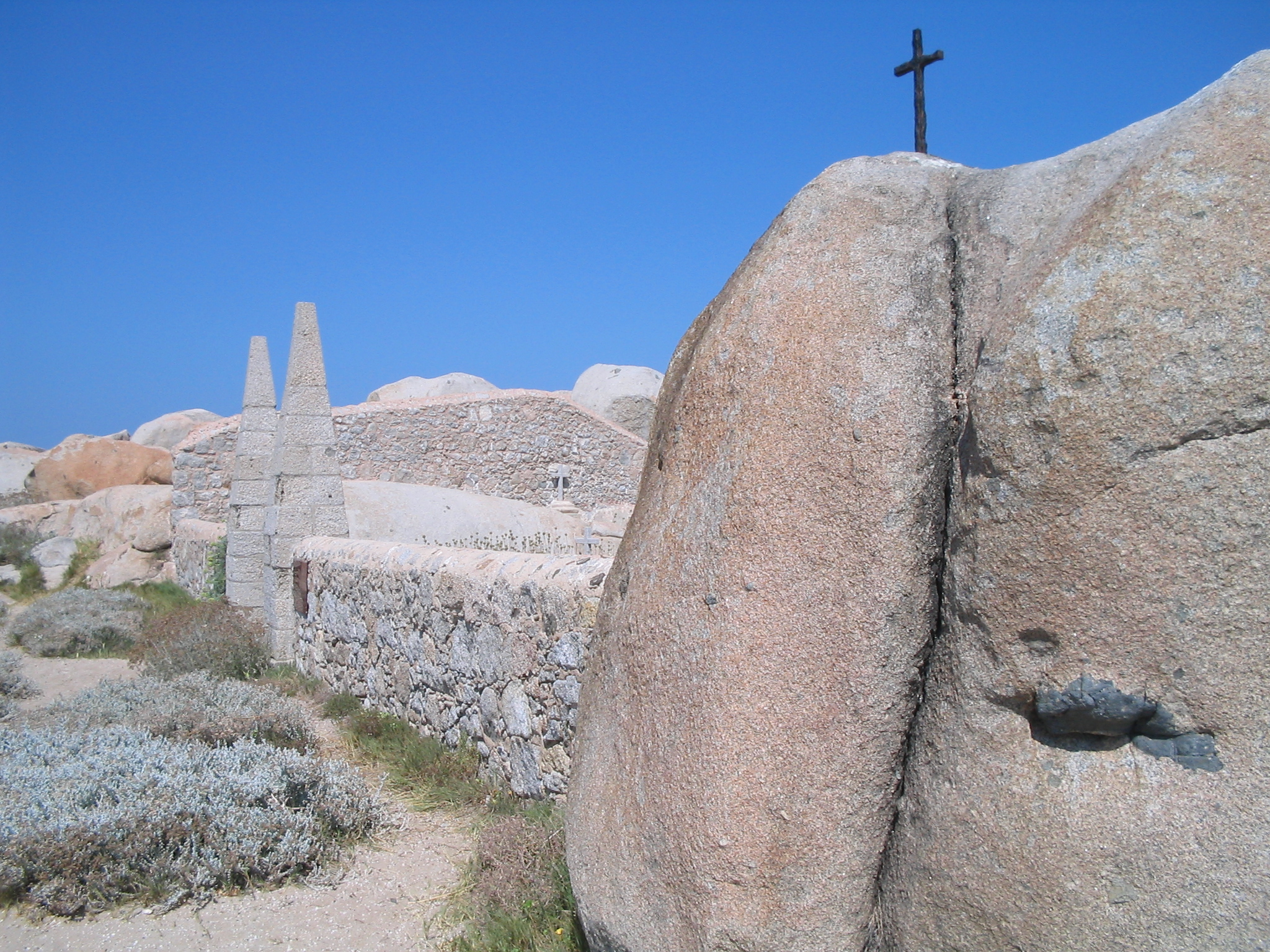 Semillante Cemetery - Lavezzi